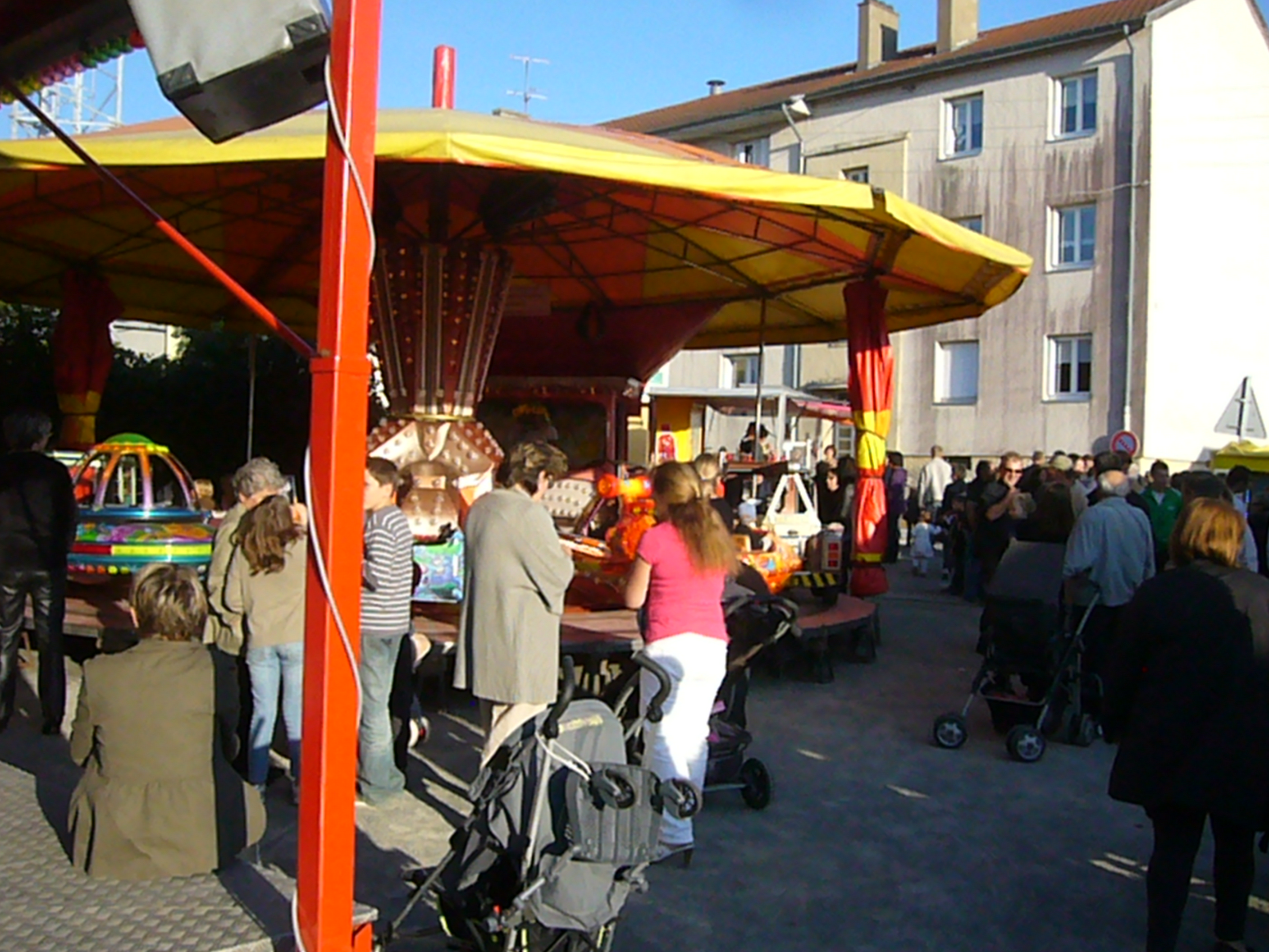 Place Fouillat lors de la fête à Violay